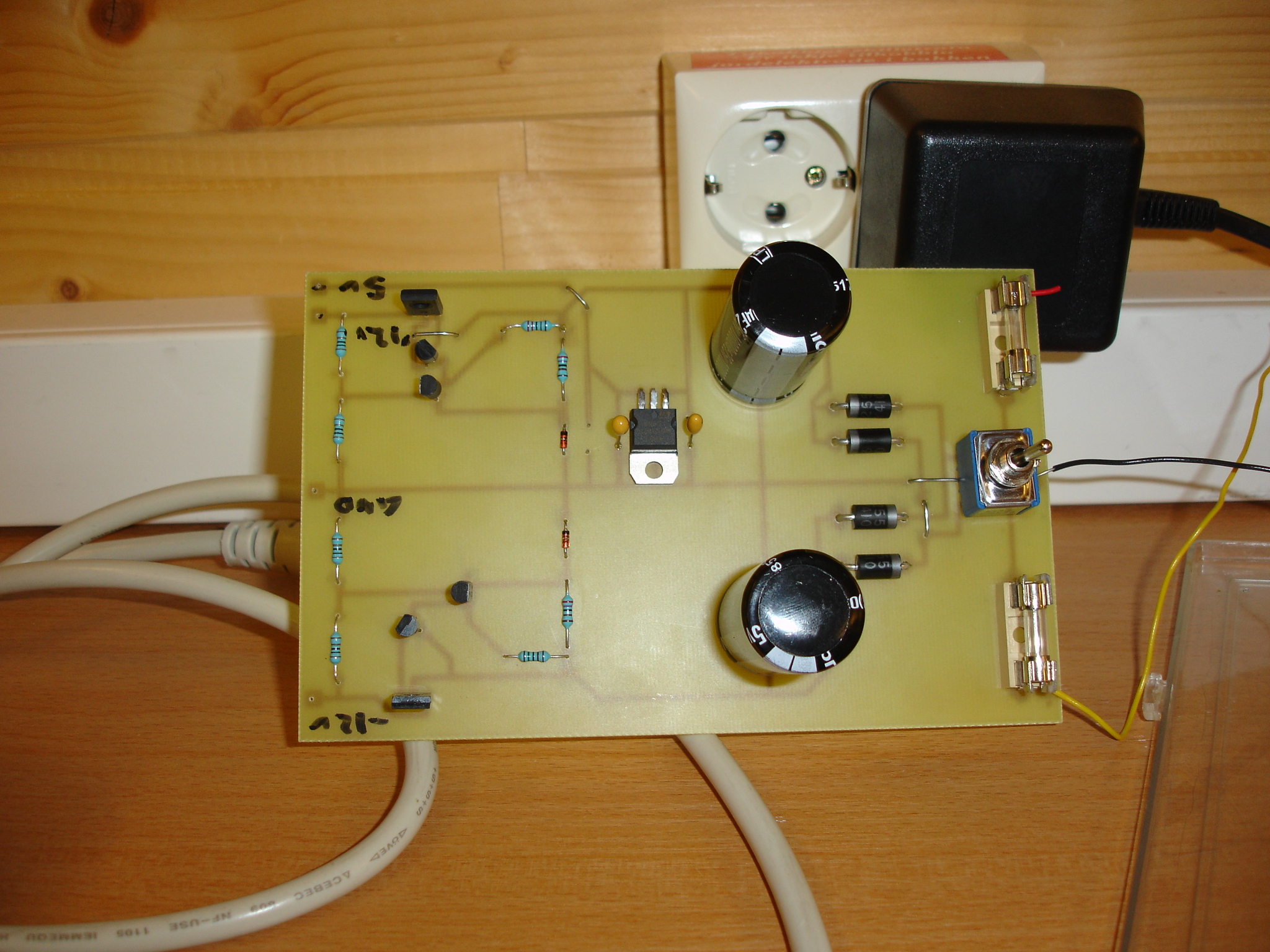 Kretskort med påloddet komponenter.